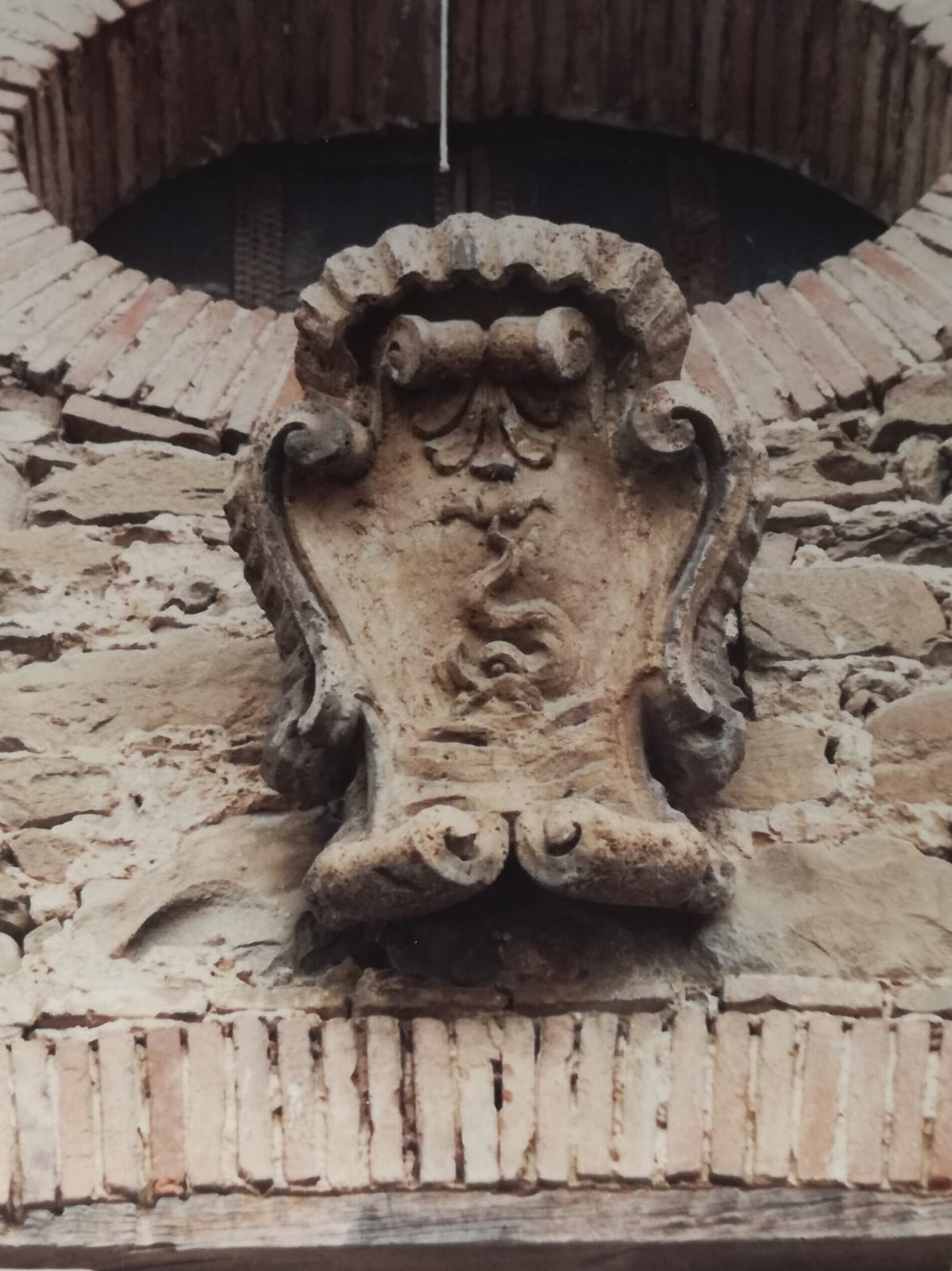 Arma sulla facciata dell'Oratorio di Santa Maria di Loreto, luogo di culto di Rio (frazione di Amatrice - provincia di Rieti). Descrizione araldica: arme con Delfino in mare fluttuante.